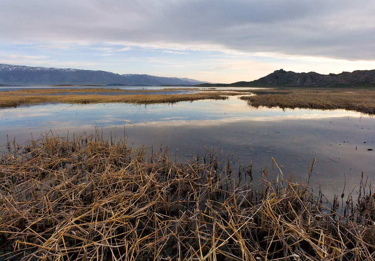 Bukhtarminskoe reservoir